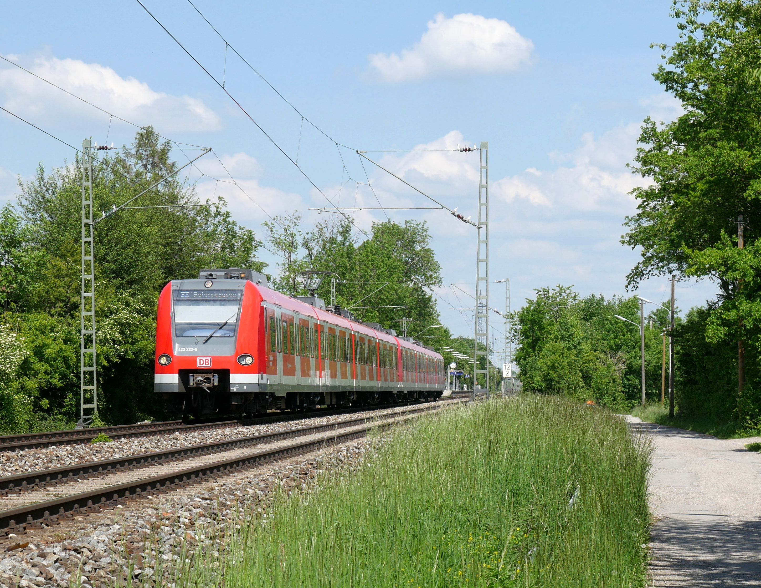 Elektrotriebwagen-Doppeltraktion der Baureihe 423, angeführt von 423 222, als S 6276 in Richtung Petershausen auf der Linie S2 der S-Bahn München im Ortsgebiet von Heimstetten. Im Hintergrund der Haltepunkt Heimstetten, rechts der Tannenweg.